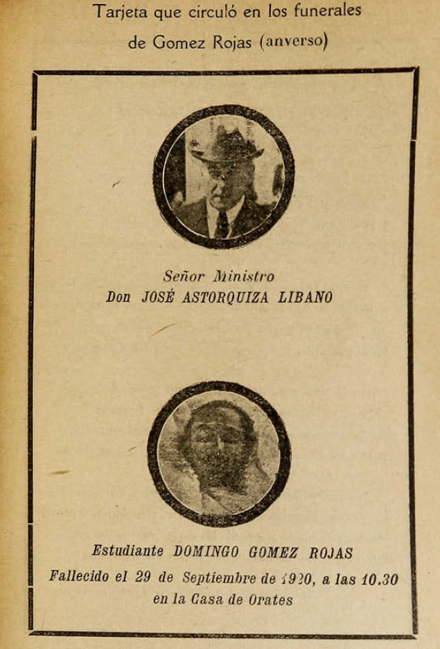 tarjeta que circuló en los funerales de Gómez Rojas (anverso). El poeta Domingo Gómez Rojas fue enviado por el juez José Astorquiza Líbano a la cárcel, donde es sometido a torturas y hostigamientos constantes. En esta situación su salud mental comenzó a resentirse; entonces se lo incomunicó en una celda especial, donde también su cuerpo manifestó los efectos de la reclusión y los abusos y donde finalmente murió.